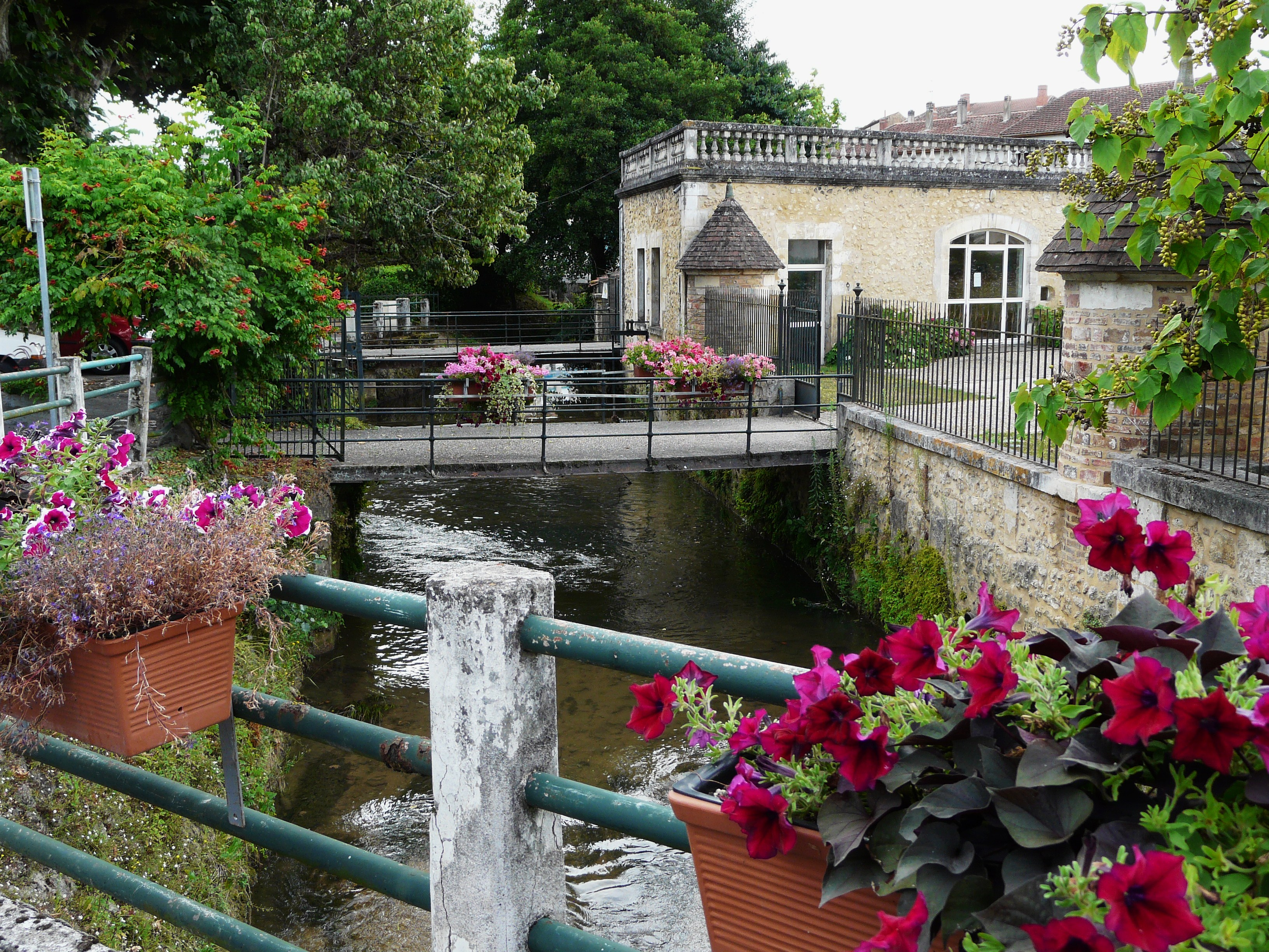 La Crempse canalisée à Mussidan